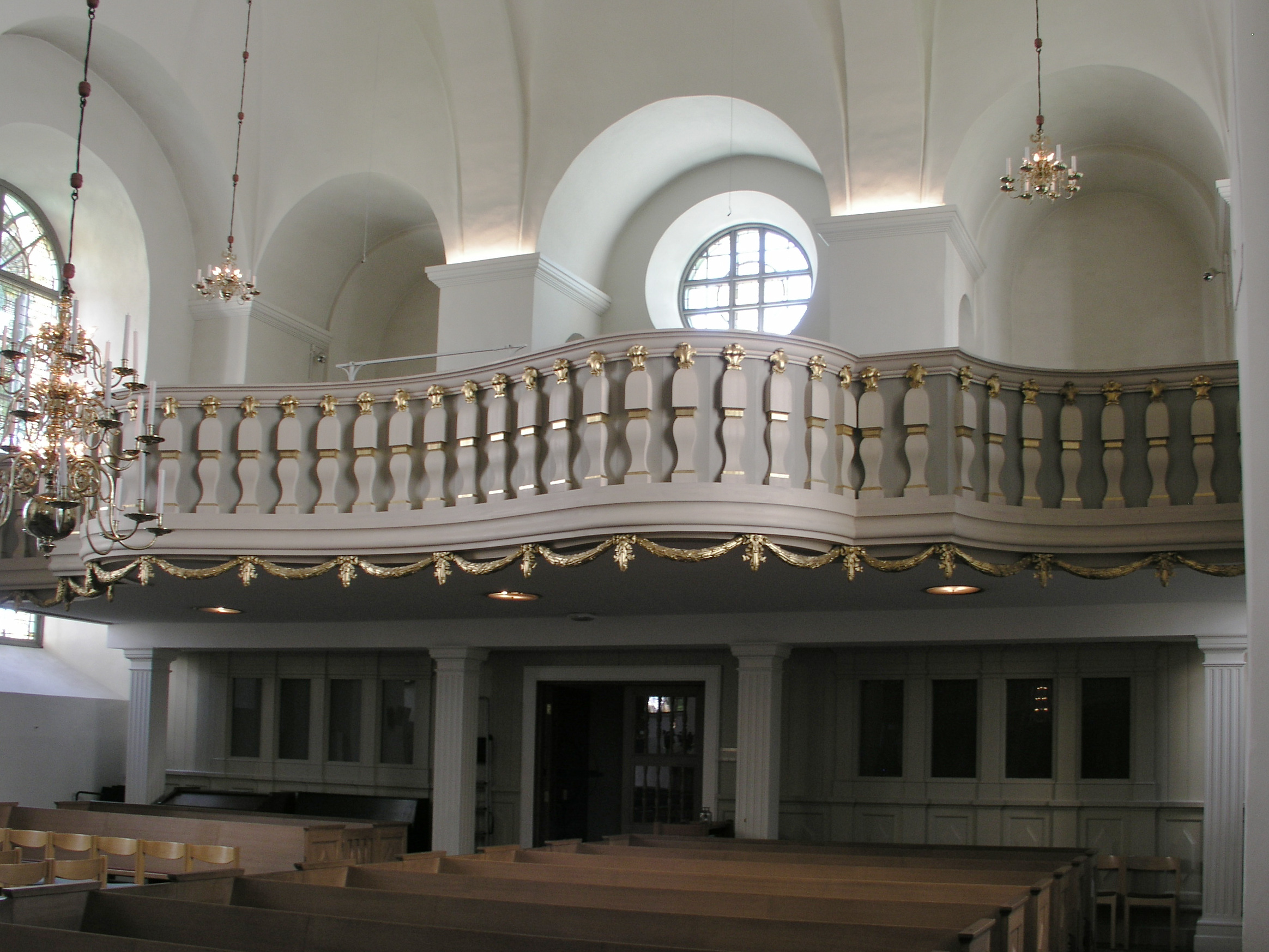 Karlstads domkyrka / Cathedral of Karlstad. Balcony.